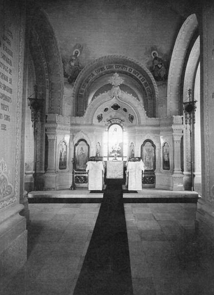 Интерьер храма-усыпальницы русских воинов в Сан-Стефано.